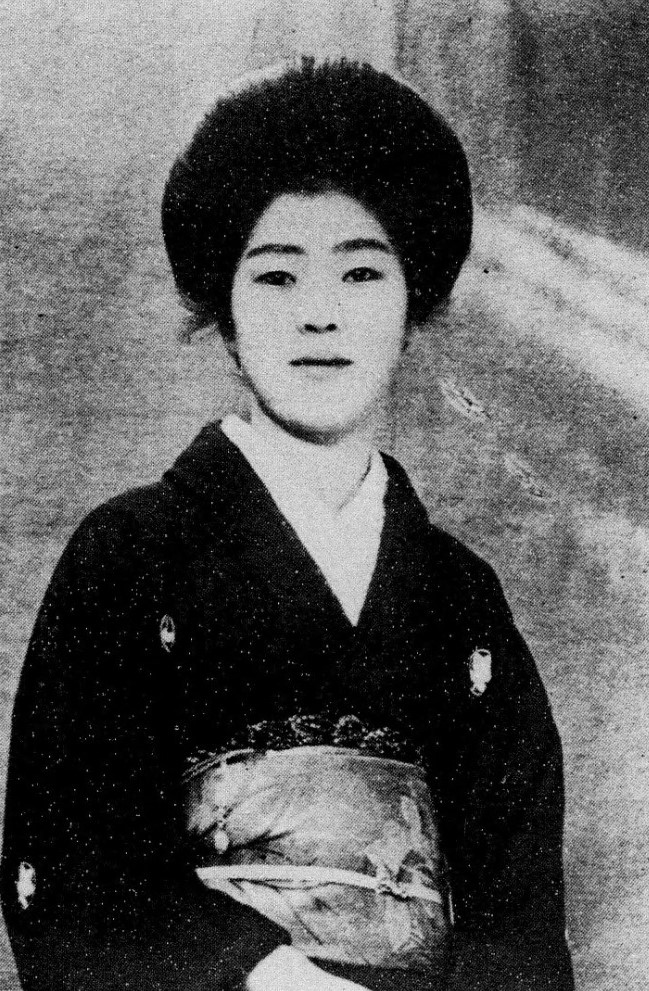 橘薫 1919